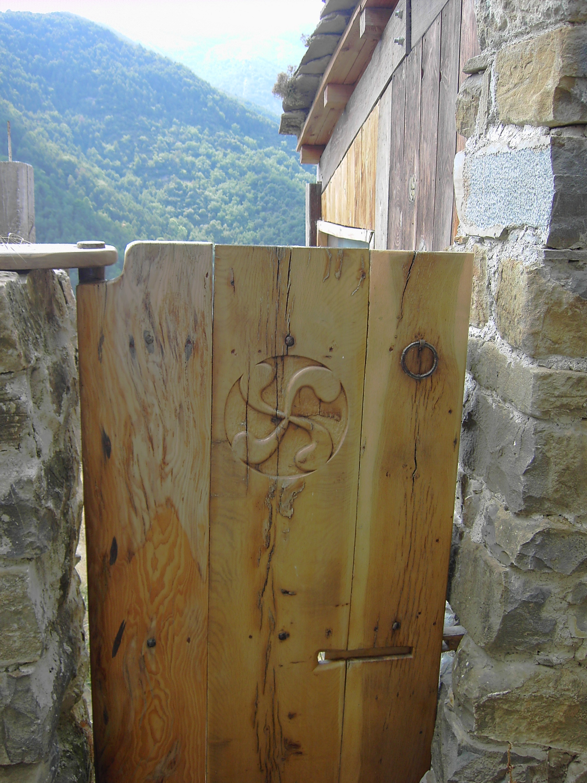 Cuetrefuellas, símbolo místico pirenaico que protege de la mala suerte.